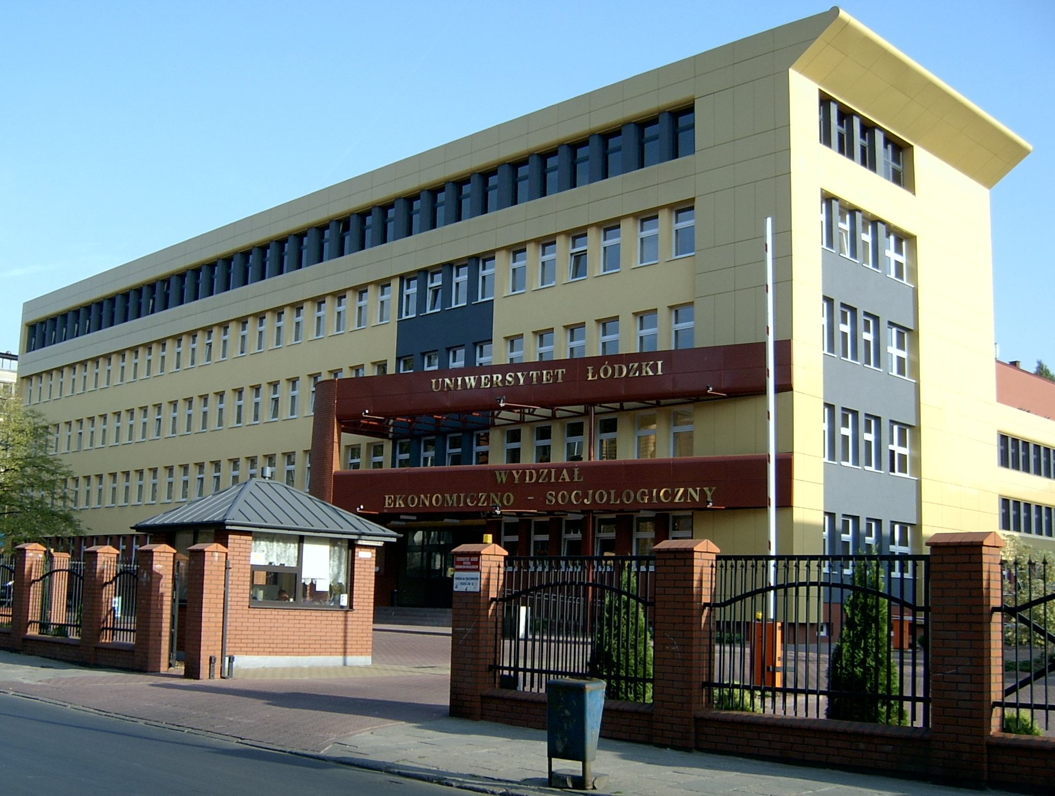 U.Ł. Ekonomiczno-Socjologiczny w Łodźi